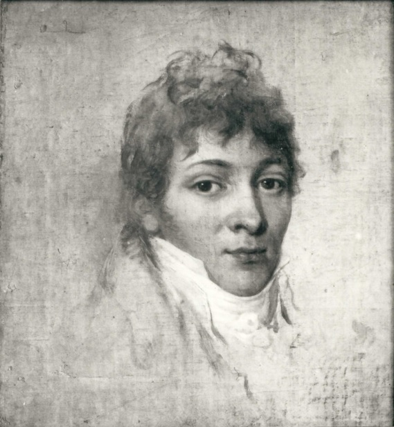 Portret mężczyzny (szkic)